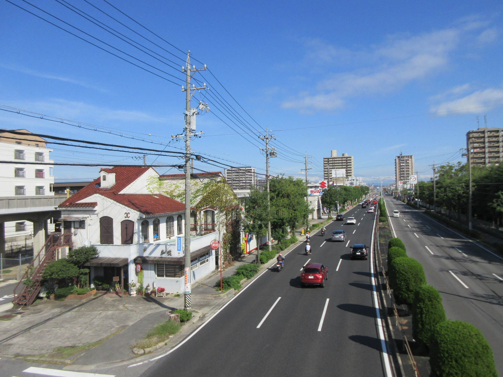 国道248号（岡崎市末広町）